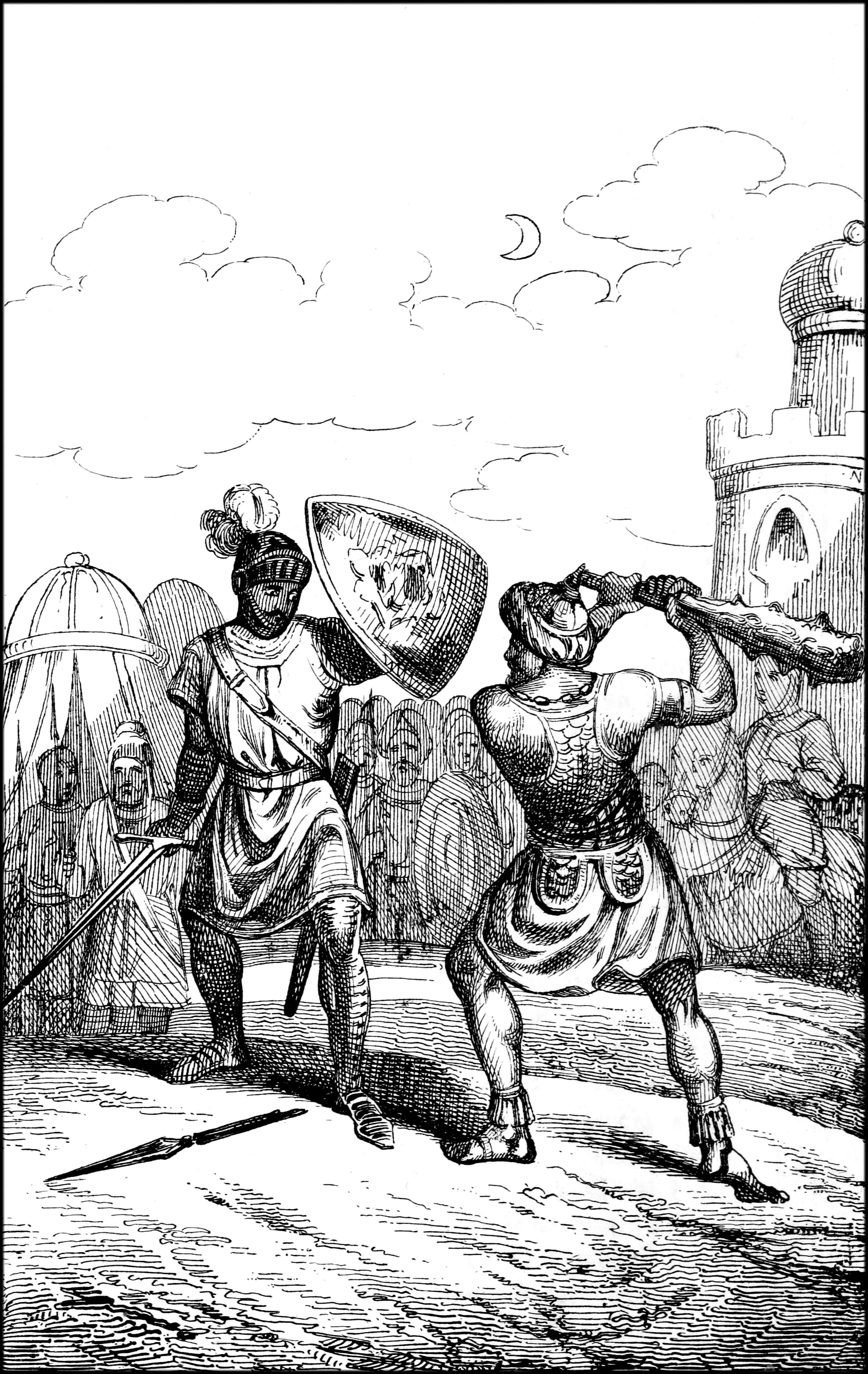 Illustrazione da Guerino detto il Meschino, di Andrea da Barberino, Milano, Tip. Guglielmini e Radaelli, 1841.